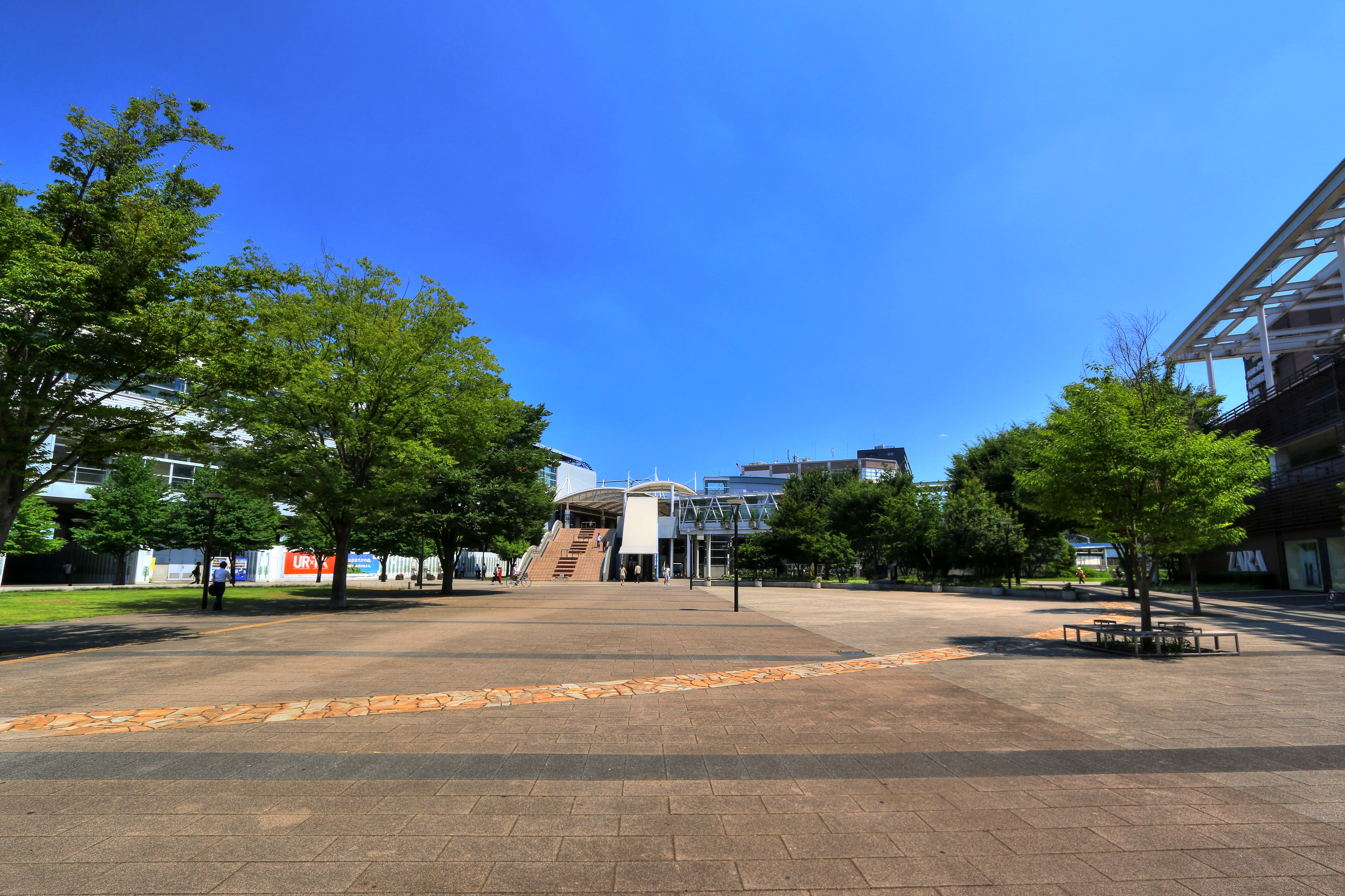 流山おおたかの森駅